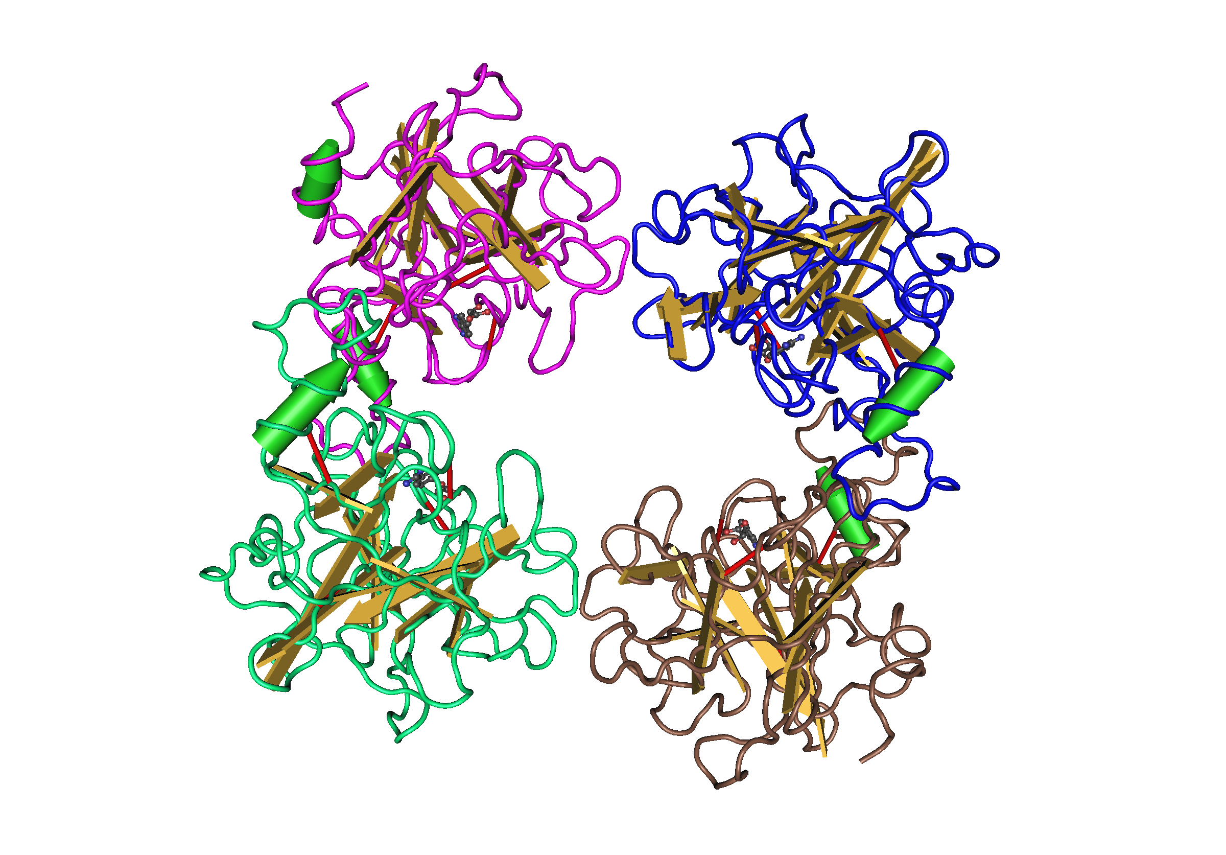 1A0L_Human_Beta-Tryptase